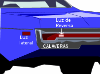 Descripción gráfica de un arreglo antiguo de calaveras en un vehículo donde se muestra la separación entre las luces laterales, las luces de reversa y el resto de luces posteriores.